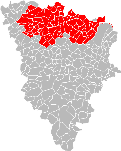 Localisation de la Communauté Urbaine Grand Paris Seine et Oise dans le département des Yvelines